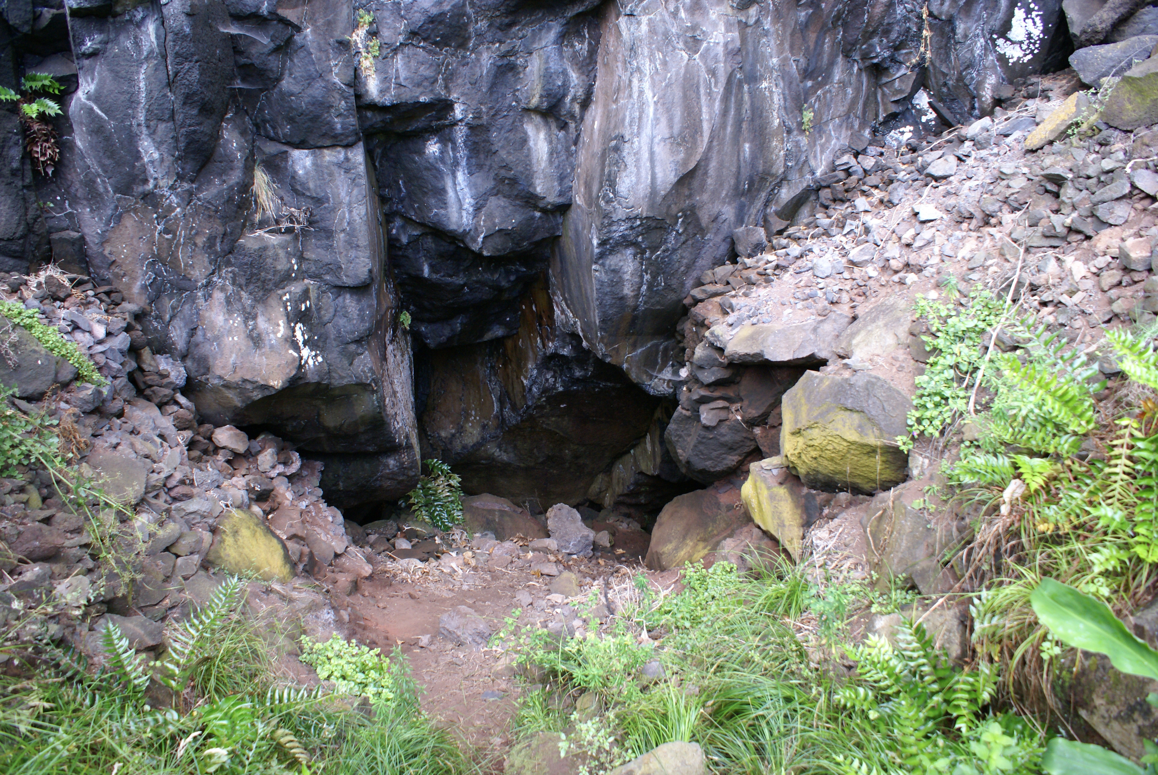 Entrada da Furna do Poio, Caldeira de Santo Cristo, Calheta, ilha de São Jorge